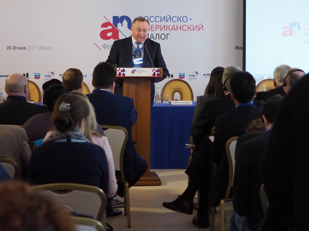 Выступление Н.П. Токарева на форуме «Российско-Американский диалог Форт Росс»